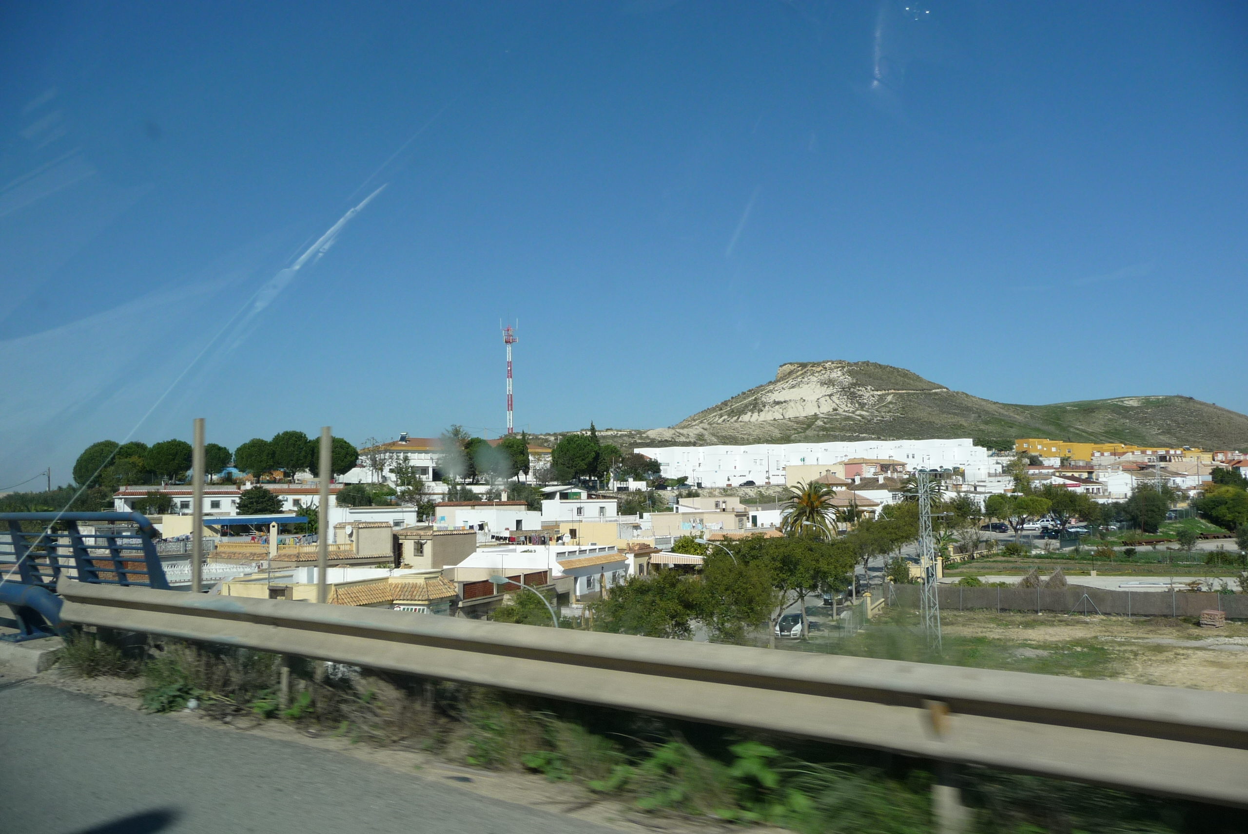 Lomopardo, Jerez de la Frontera. (Andalusia, Spain).